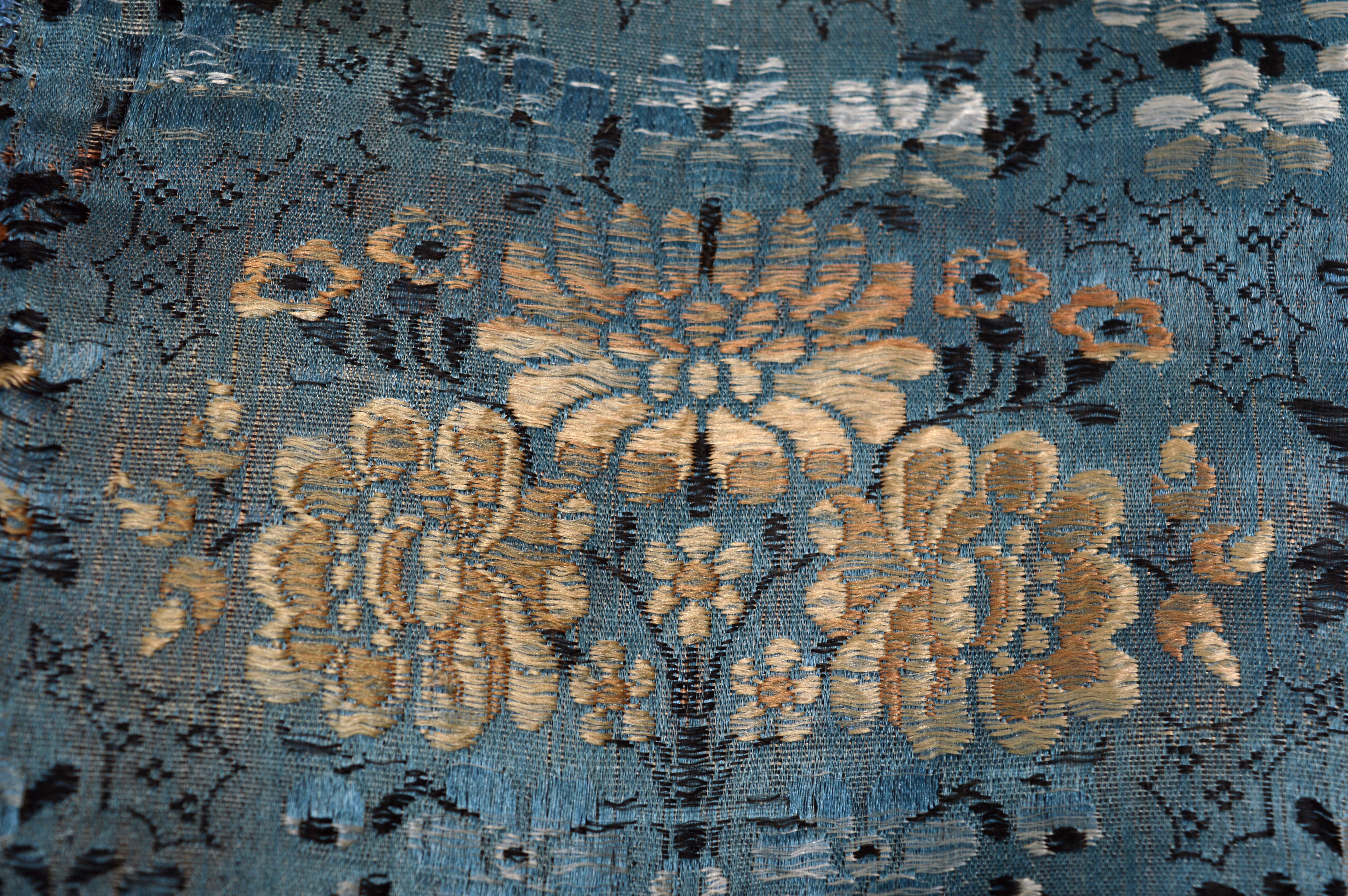 Gorset damski, Podhale, detal. Muzeum Tatrzańskie w Zakopanem